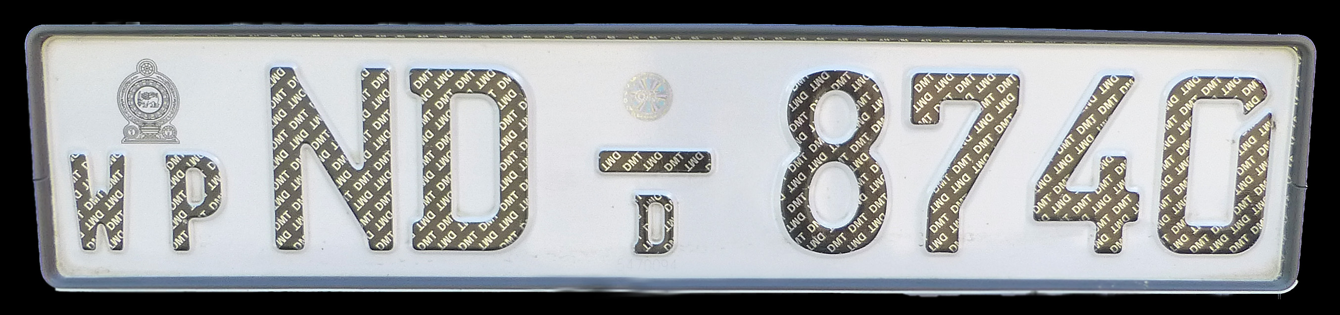 Plaque d'immatriculation du Sri Lanka (Western Province)